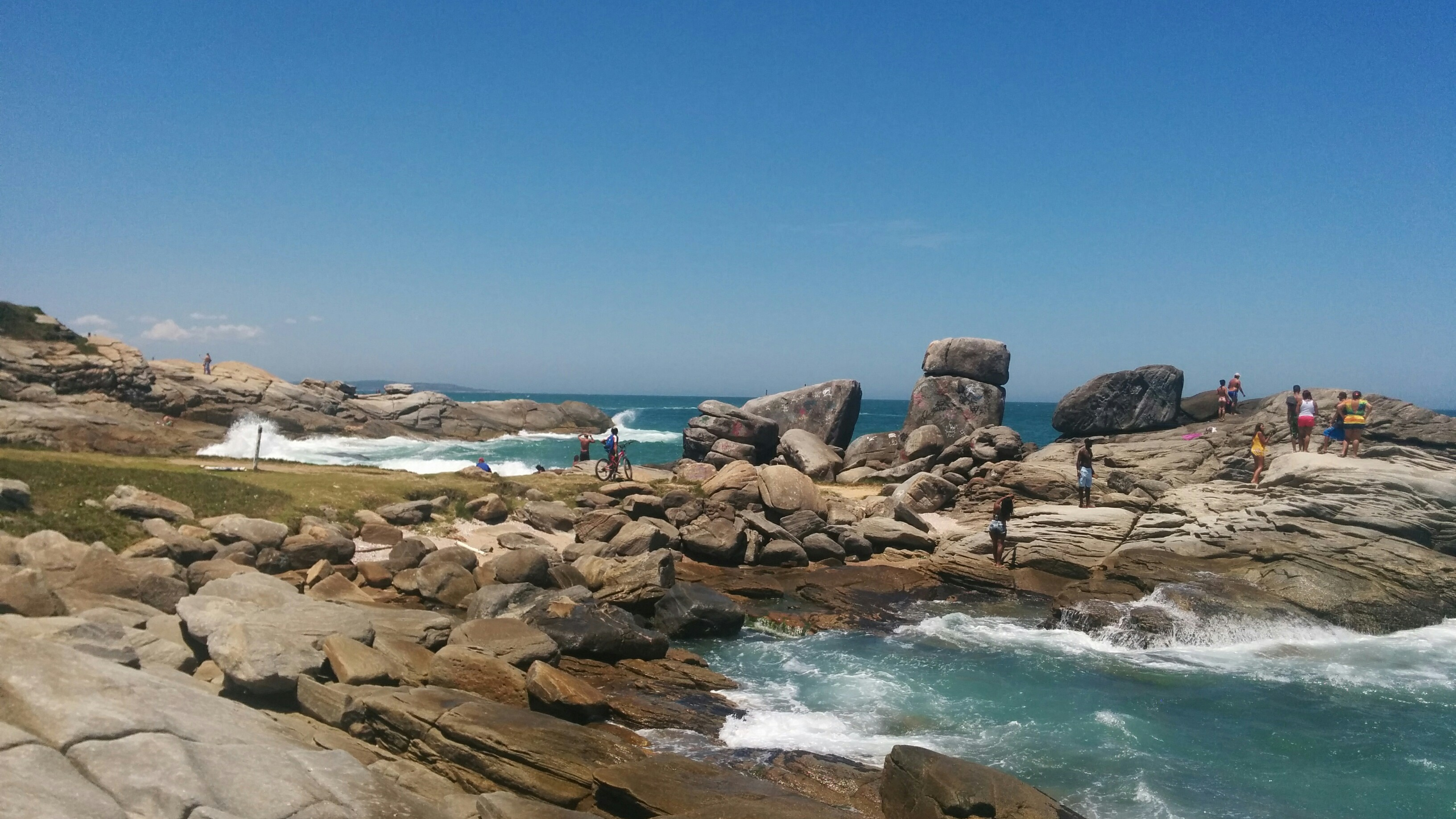 Pedras da Costa Azul em Rio das Ostras